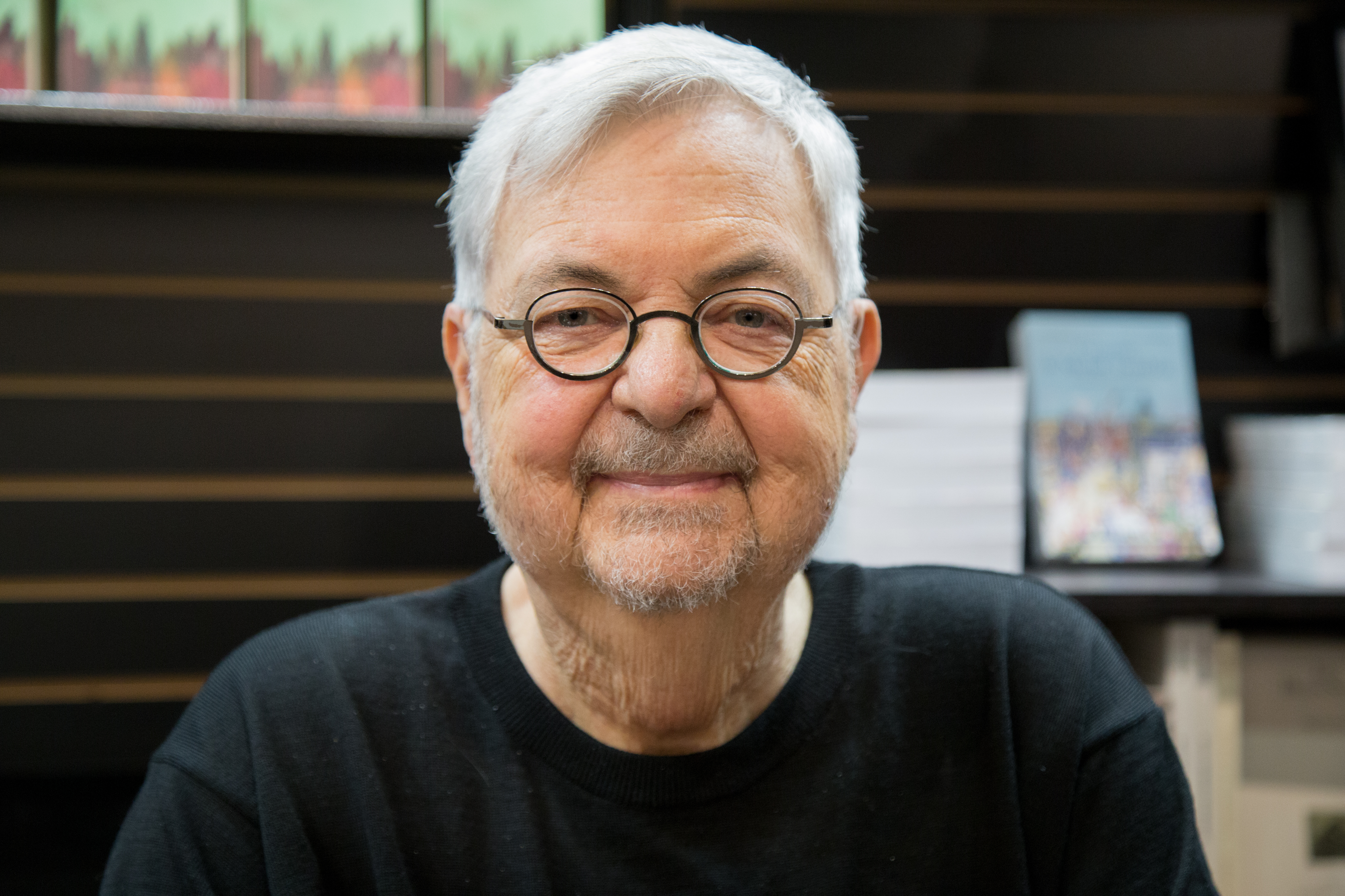 Michel Tremblay lors du Salon du livre de Montréal 2017 à la Place Bonaventure.